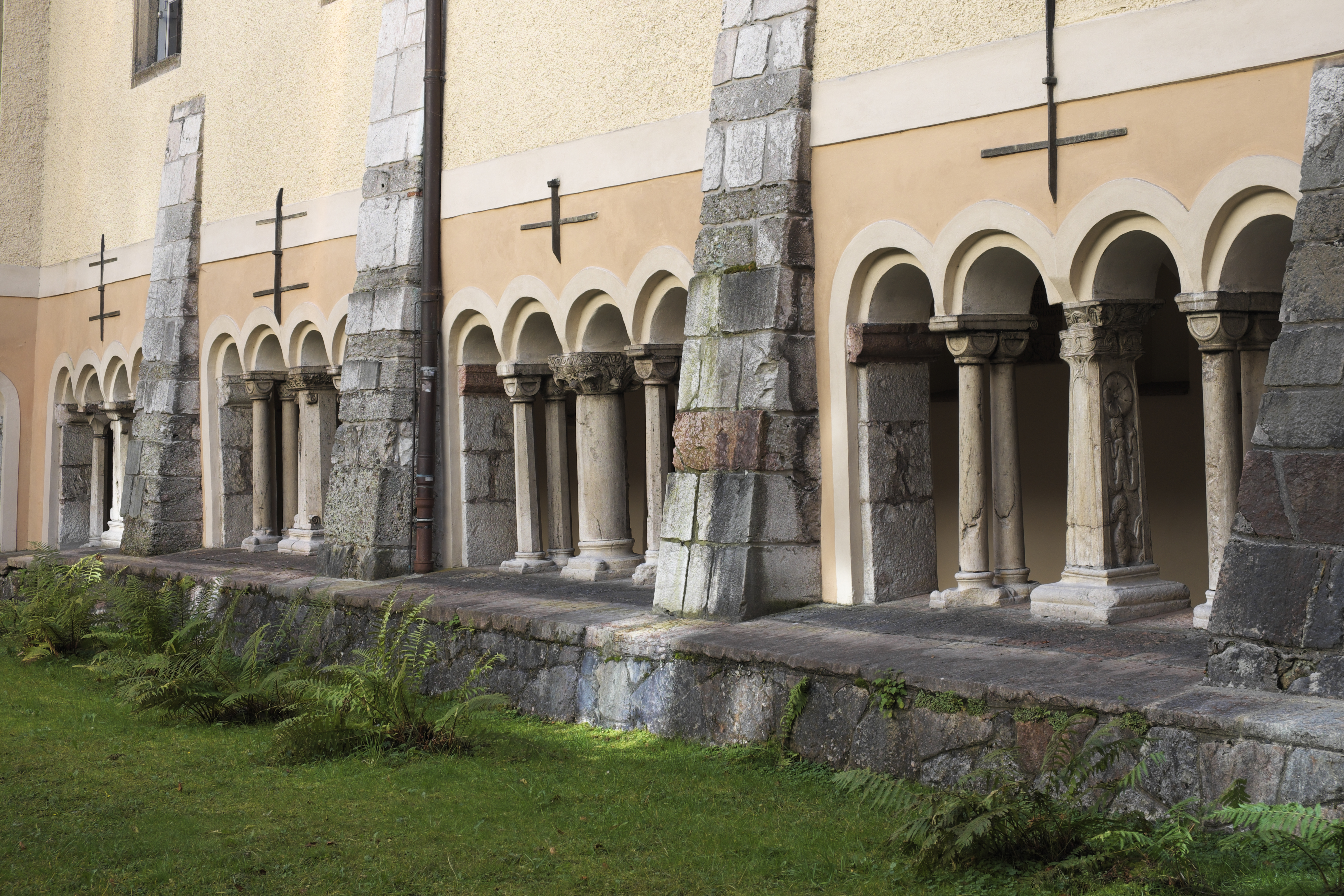 Kreuzgang des ehemaligen Augustiner-Chorherrenstiftes St. Peter und Johannes der Täufer, später Königliches Schloss Berchtesgaden, heute Museum, in Berchtesgaden im Landkreis Berchtesgadener Land (Bayern/Deutschland)